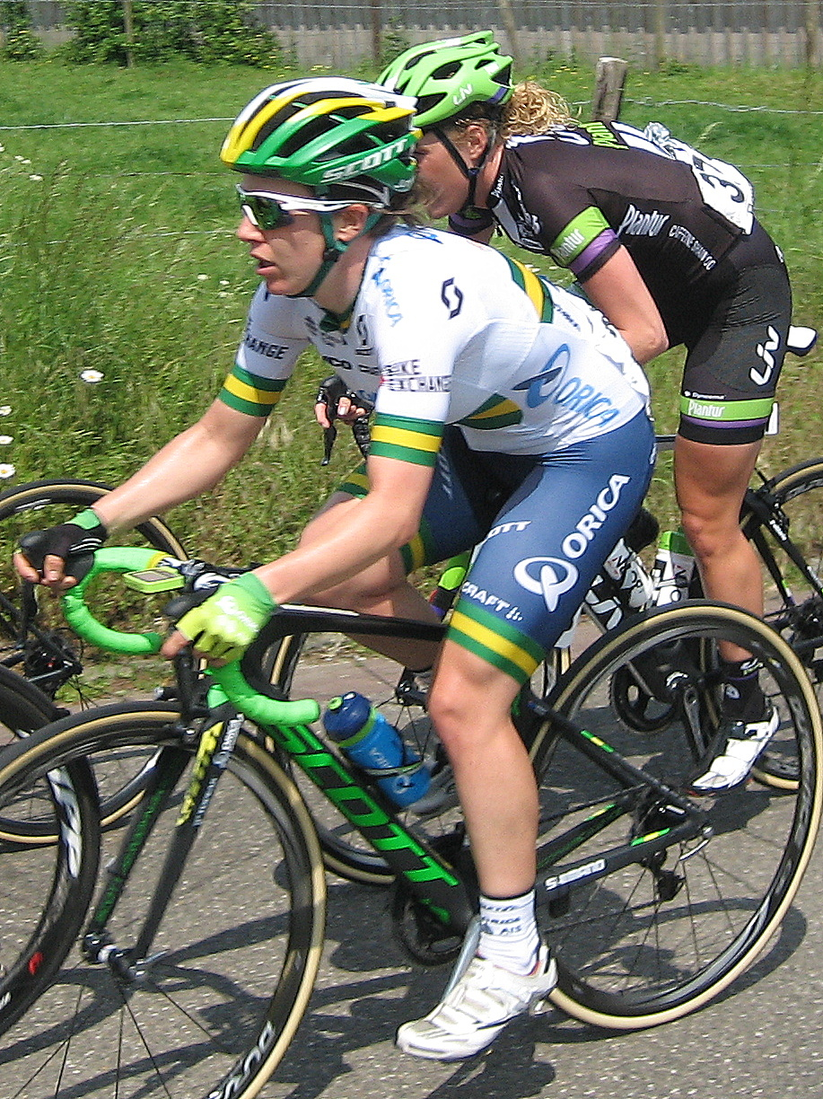 Amanda Spratt (Orica-AIS) in Hills Classic 2016